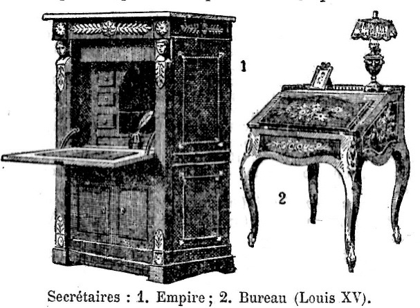 Secrétaire à abattant et bureau en pente (larousse Universel de 1923 page 914)